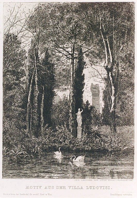 Motive from "Villa Ludovisi", Rome.